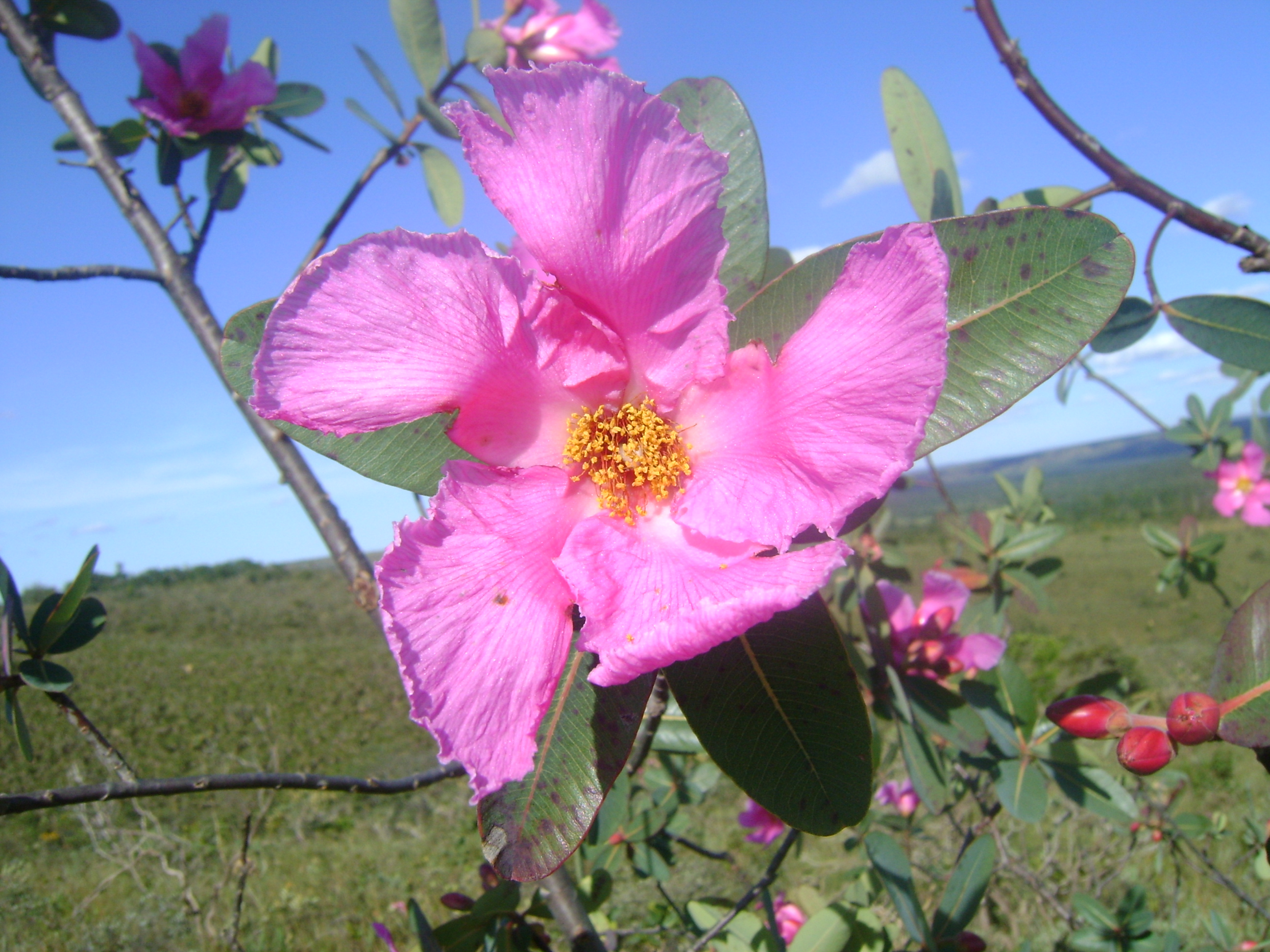 Flor de Rosa-do-Cerrado, Kielmeyera rubriflora.